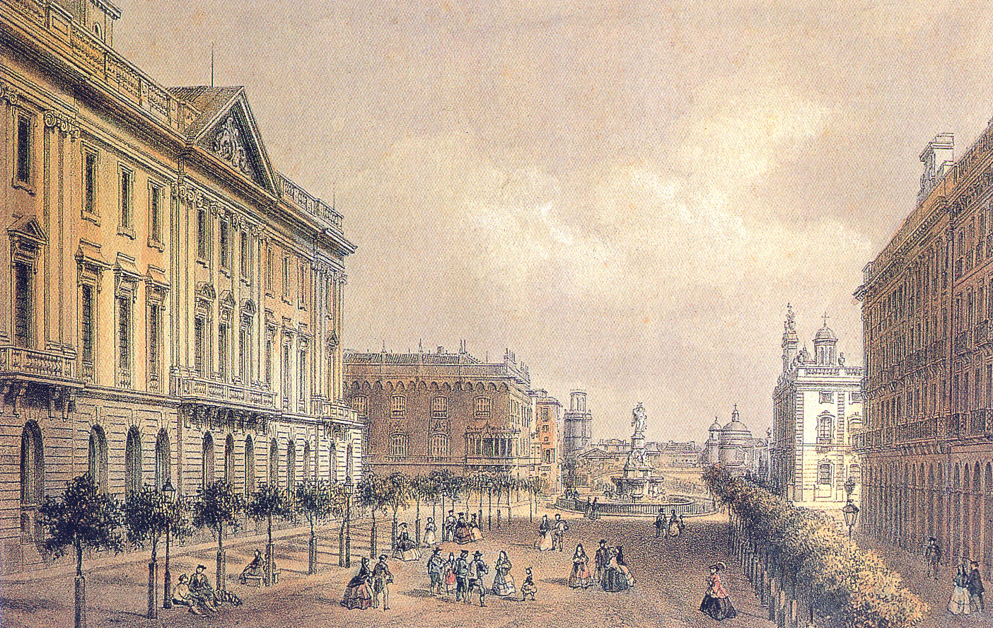 Proyecto de reordenación de Pla de Palau (1844-1848).